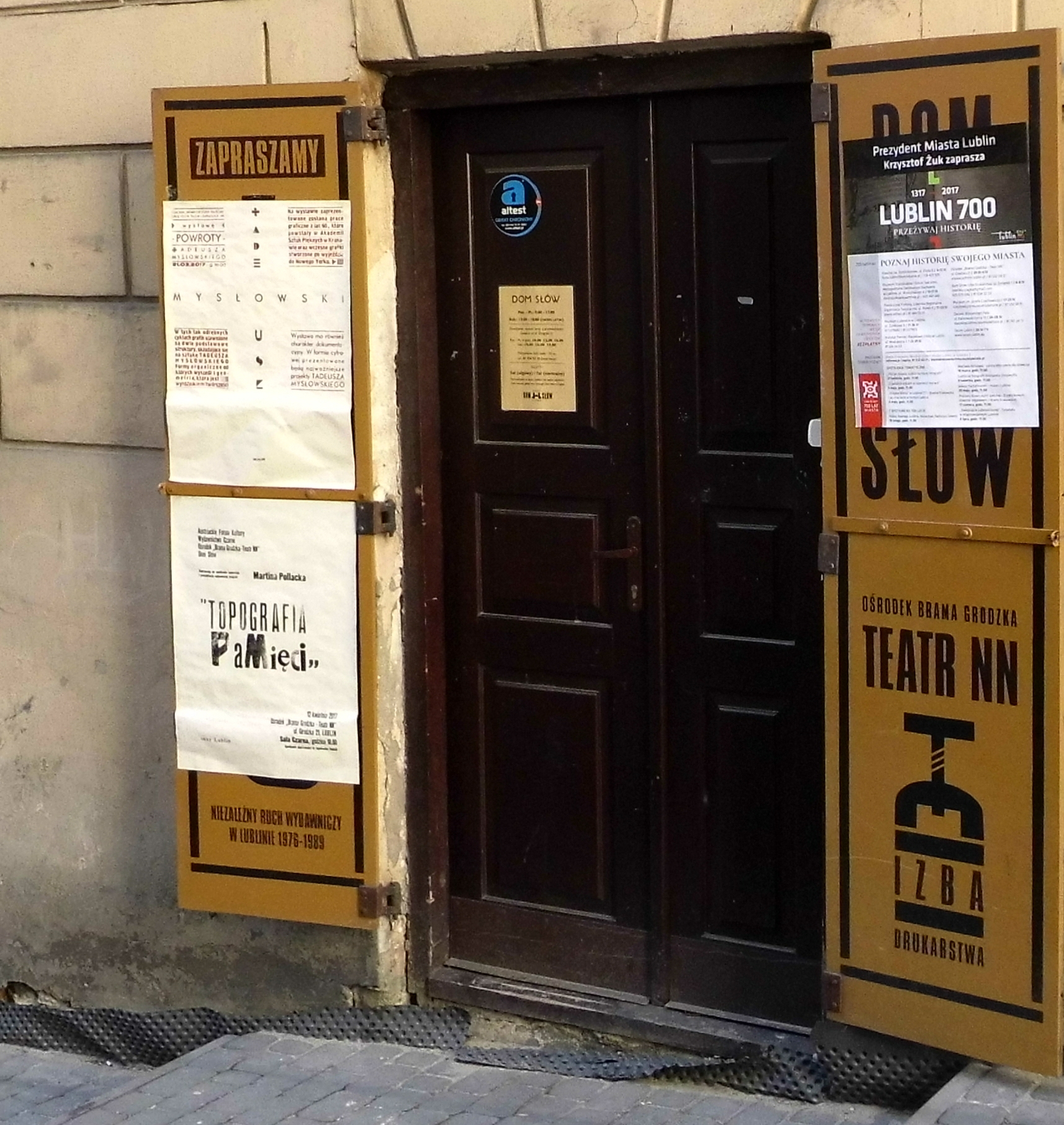 Wejście do Domu Słów.